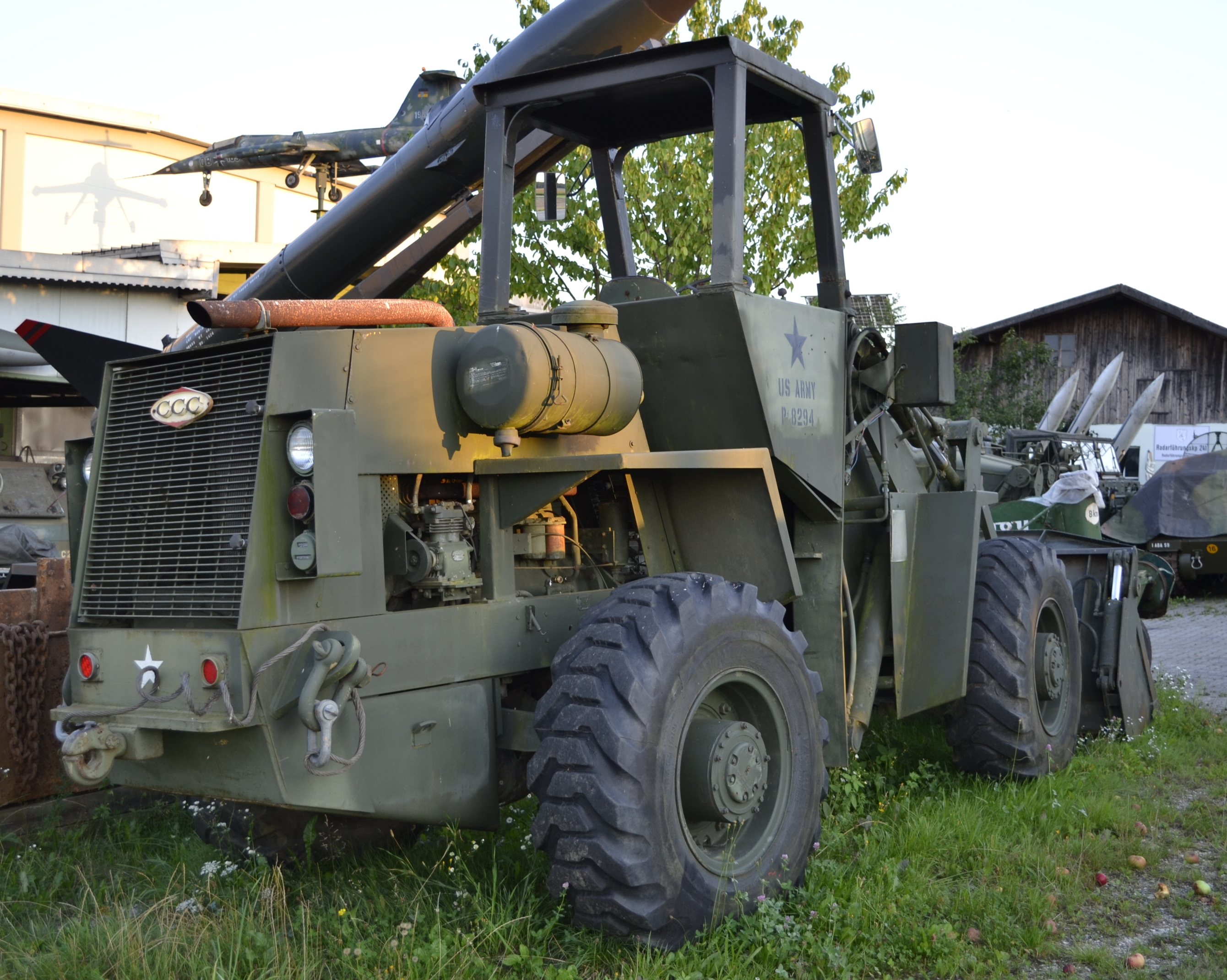 This CCC-loader was once in service with the United States Army.